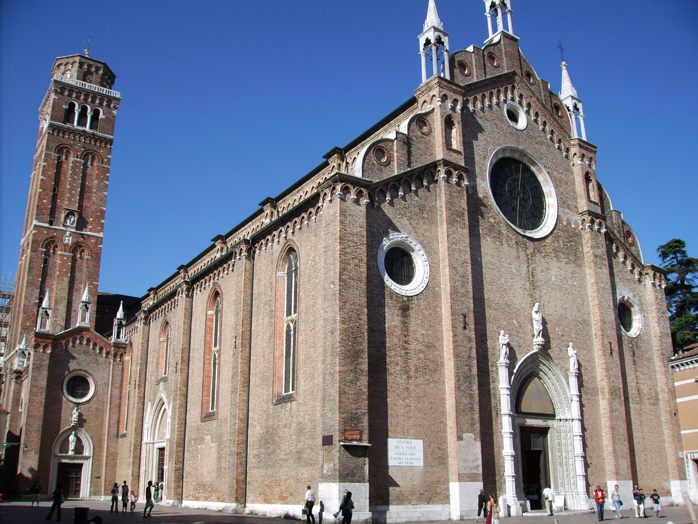 Santa Maria Gloriosa dei Frari in Venezia